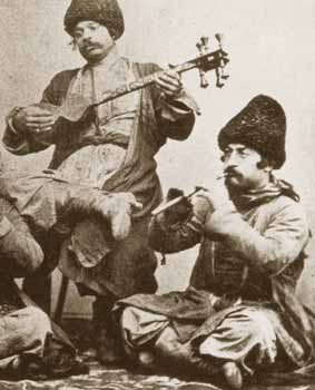 Цыгане-боша. Фотография XIX века. Из книги Н.Бессонова и Н.Деметер «История цыган. Новый взгляд»